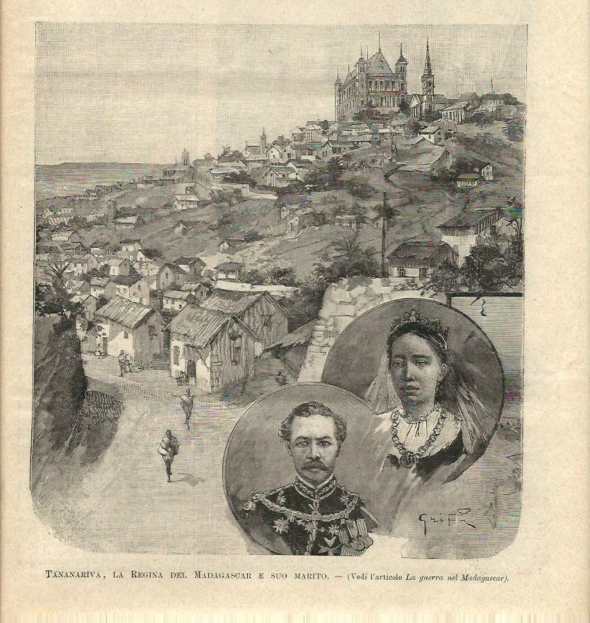 Il palazzo reale ad Antananarivo, ritratti della regina del Madagascar Ranavalona III (1883-1897) e di suo marito, primo ministro, Rainilaiarivony